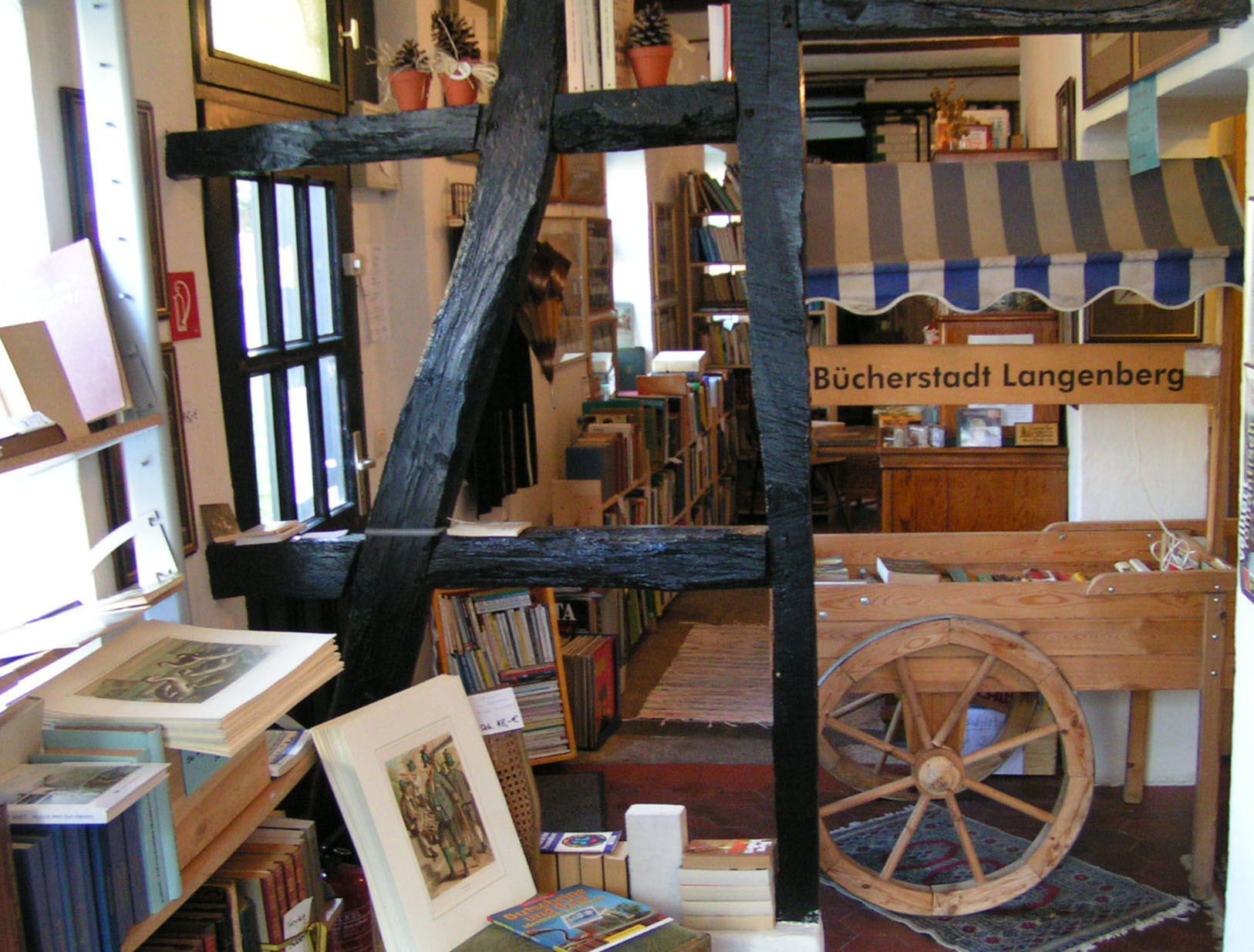 Bücherstadt Langenberg, ein Antiquariat in der Altstadt Source: own work Date: April 2006, Velbert-Langenberg, Germany Author: Maschinenjunge Licence: GFDL, cc-by 3.0